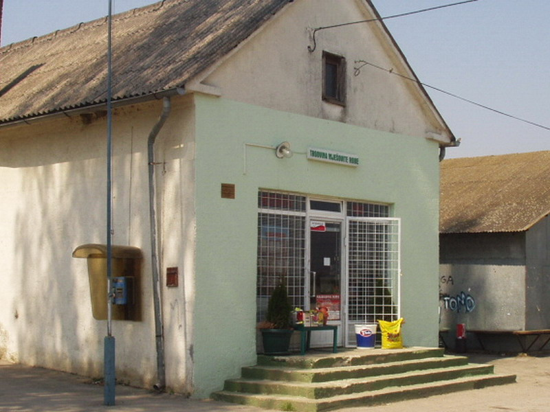 Štakorovec - Dućan